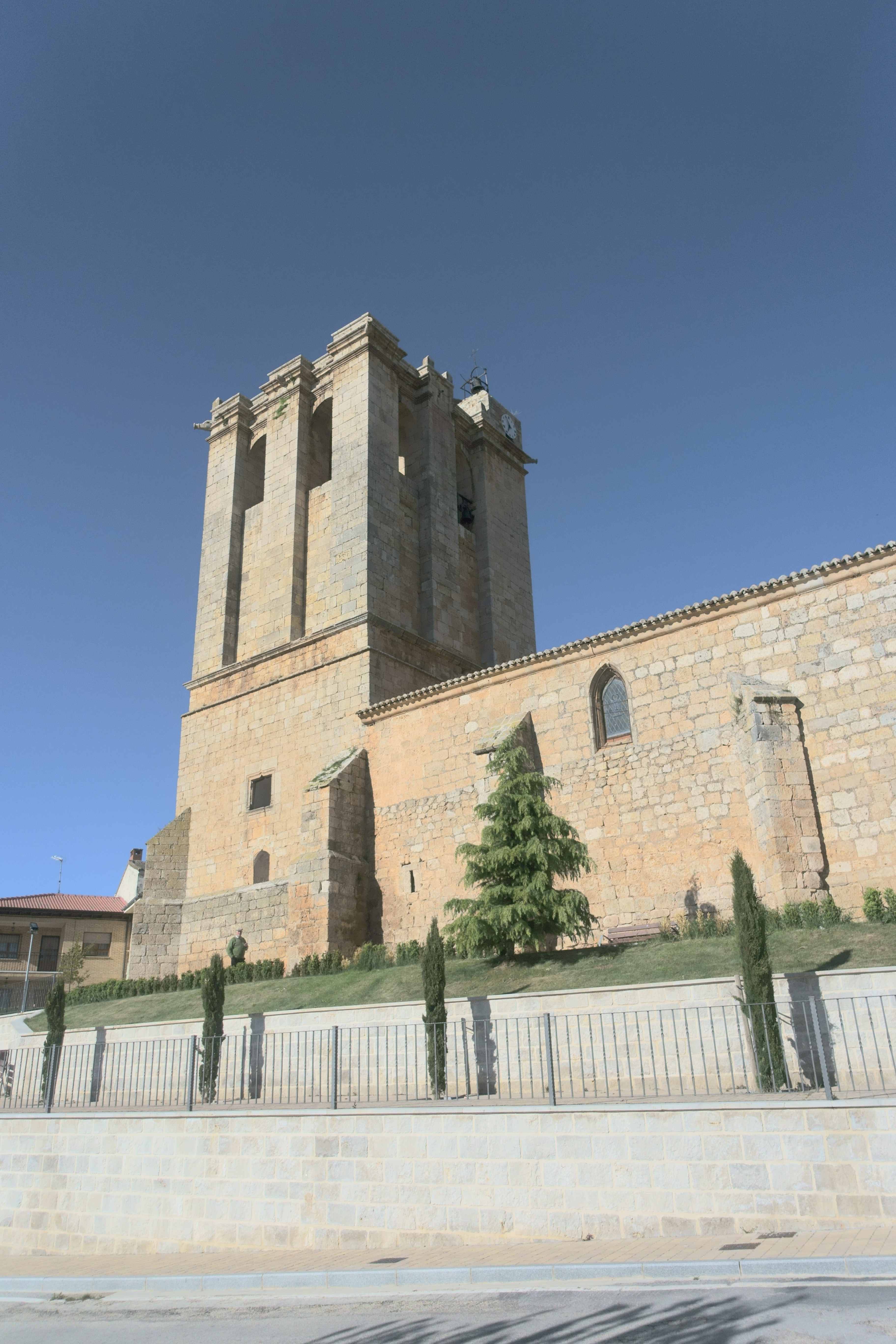 Iglesia de la Asunción, Villalmanzo (Burgos, España).